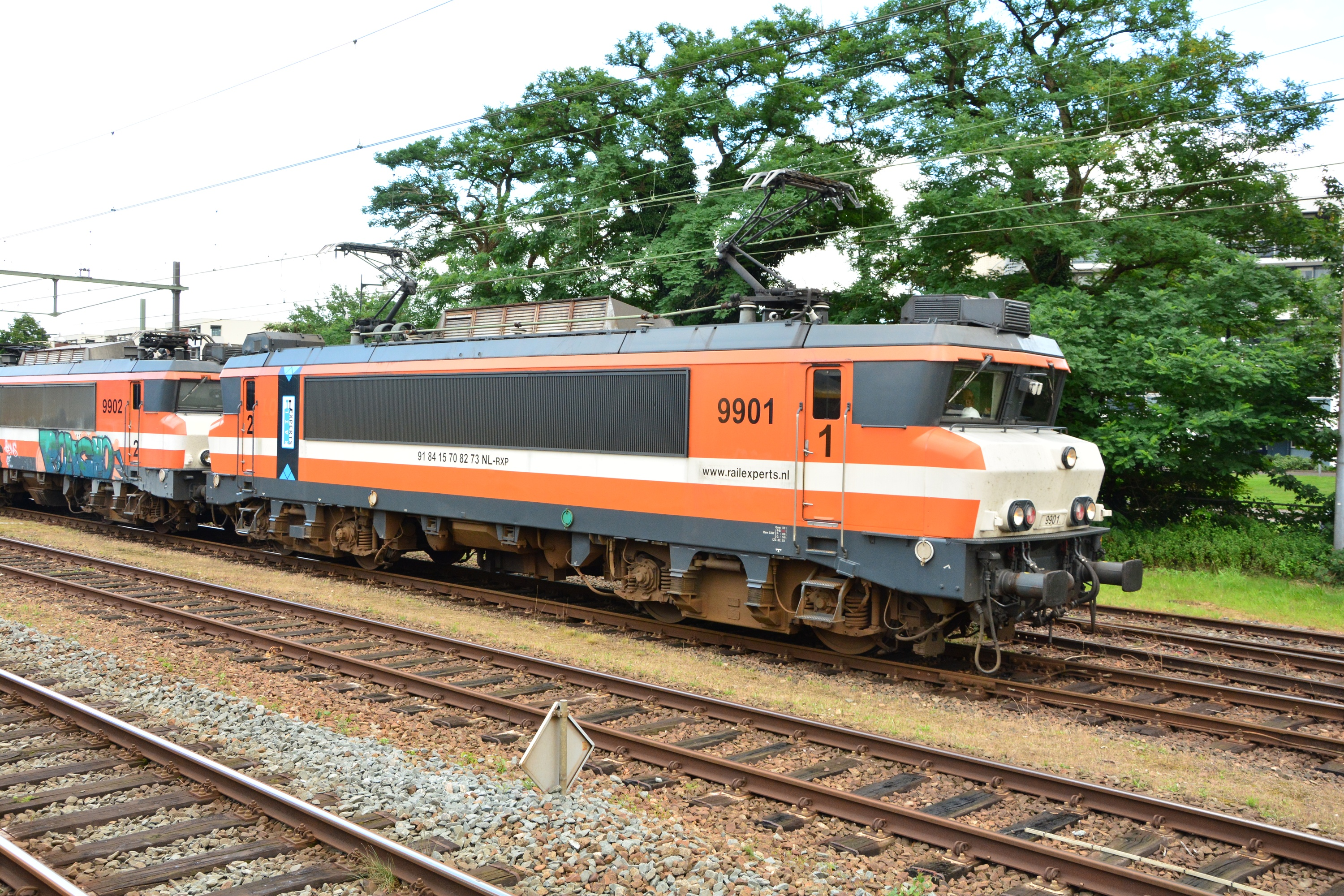 Railexperts 9901 (oorspronkelijk NS 1627), Apeldoorn 14-07-2014